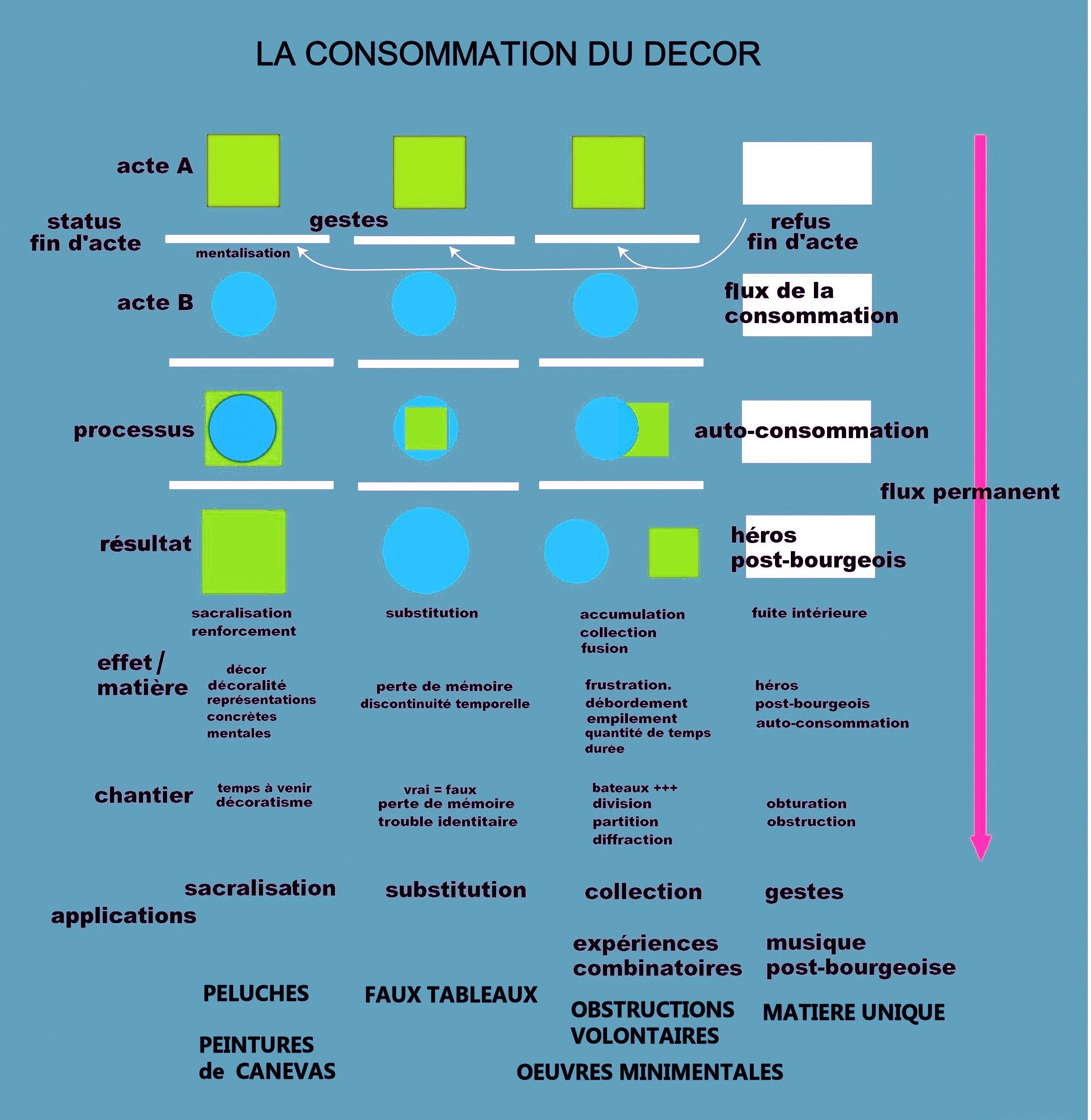 Schéma descriptif du décoratisme